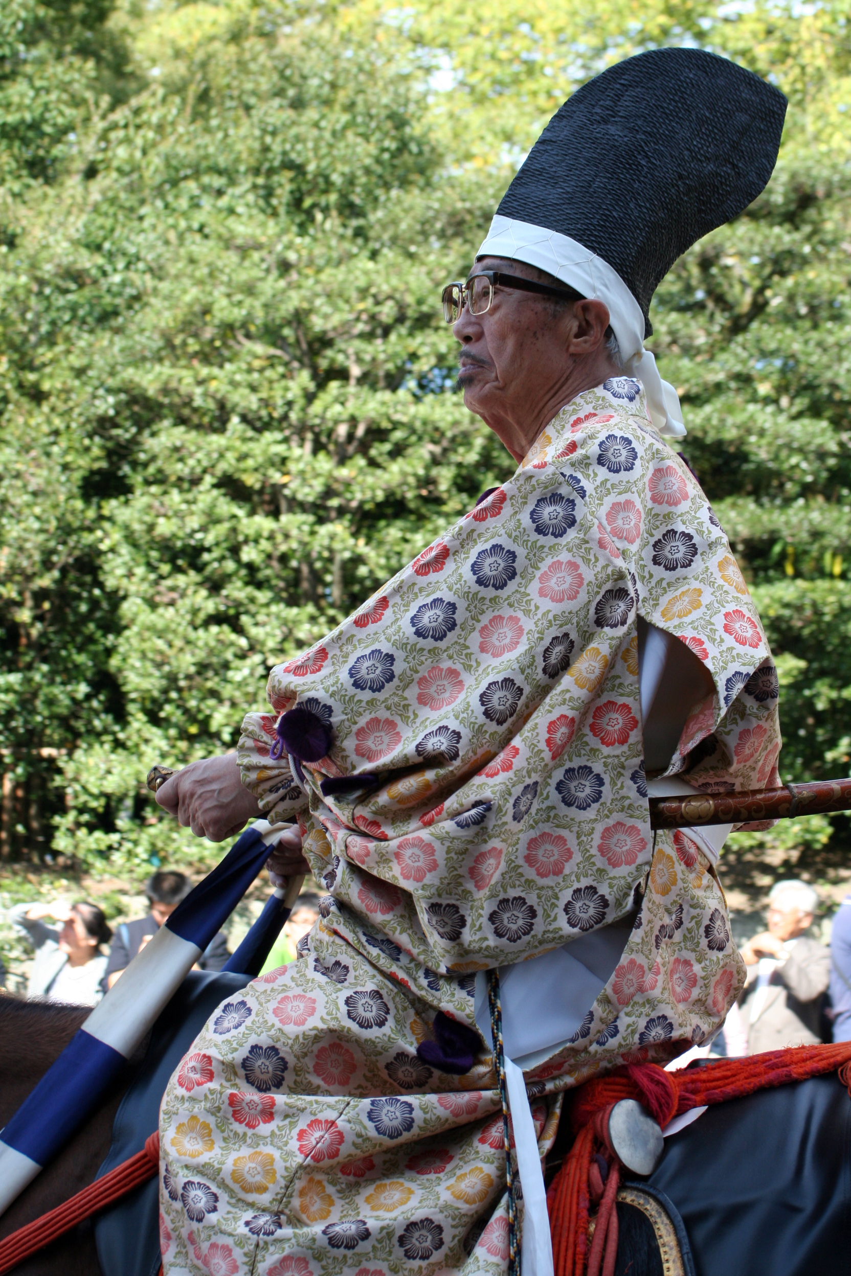 京都府京都市にて開催された時代祭。正午の御所から平安神宮までの行進の様子。2009年10月22日撮影。